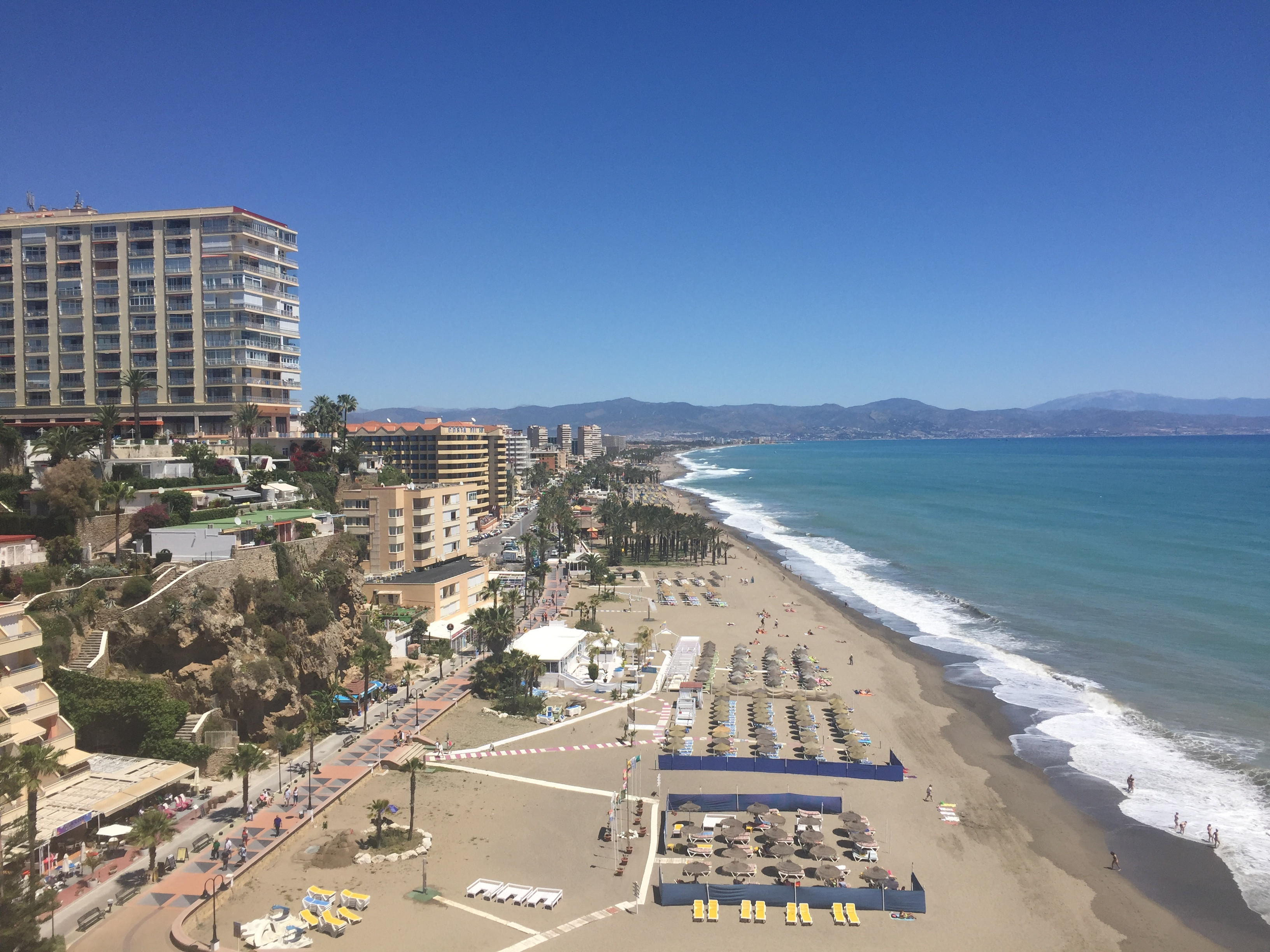 29620 Torremolinos, Málaga, Spain